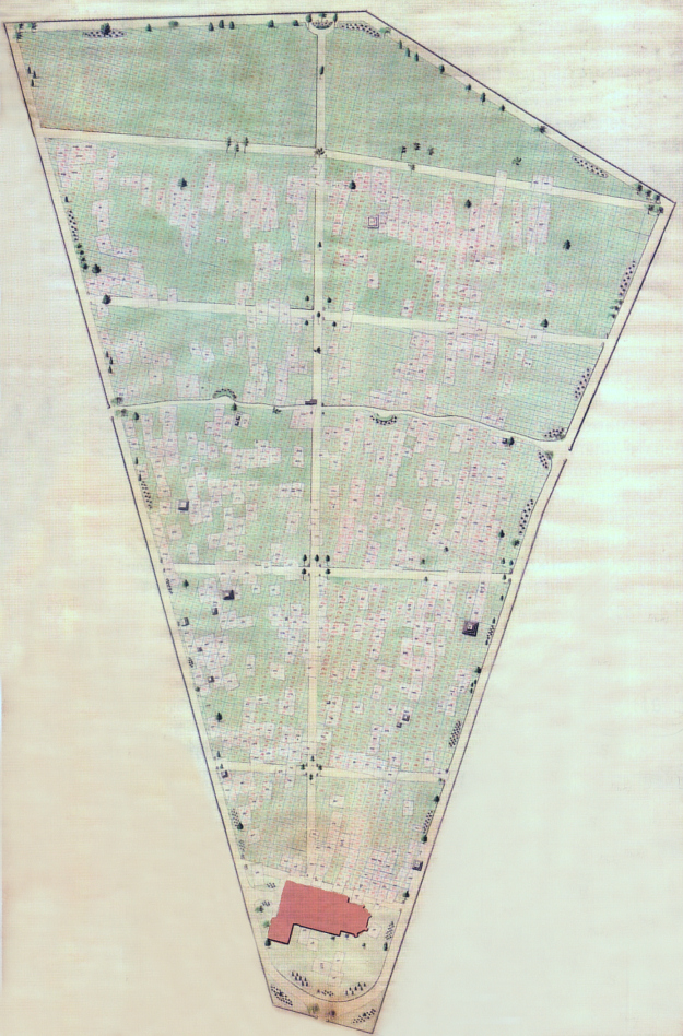 Alter St.-Nikolai-Friedhof (Hannover)